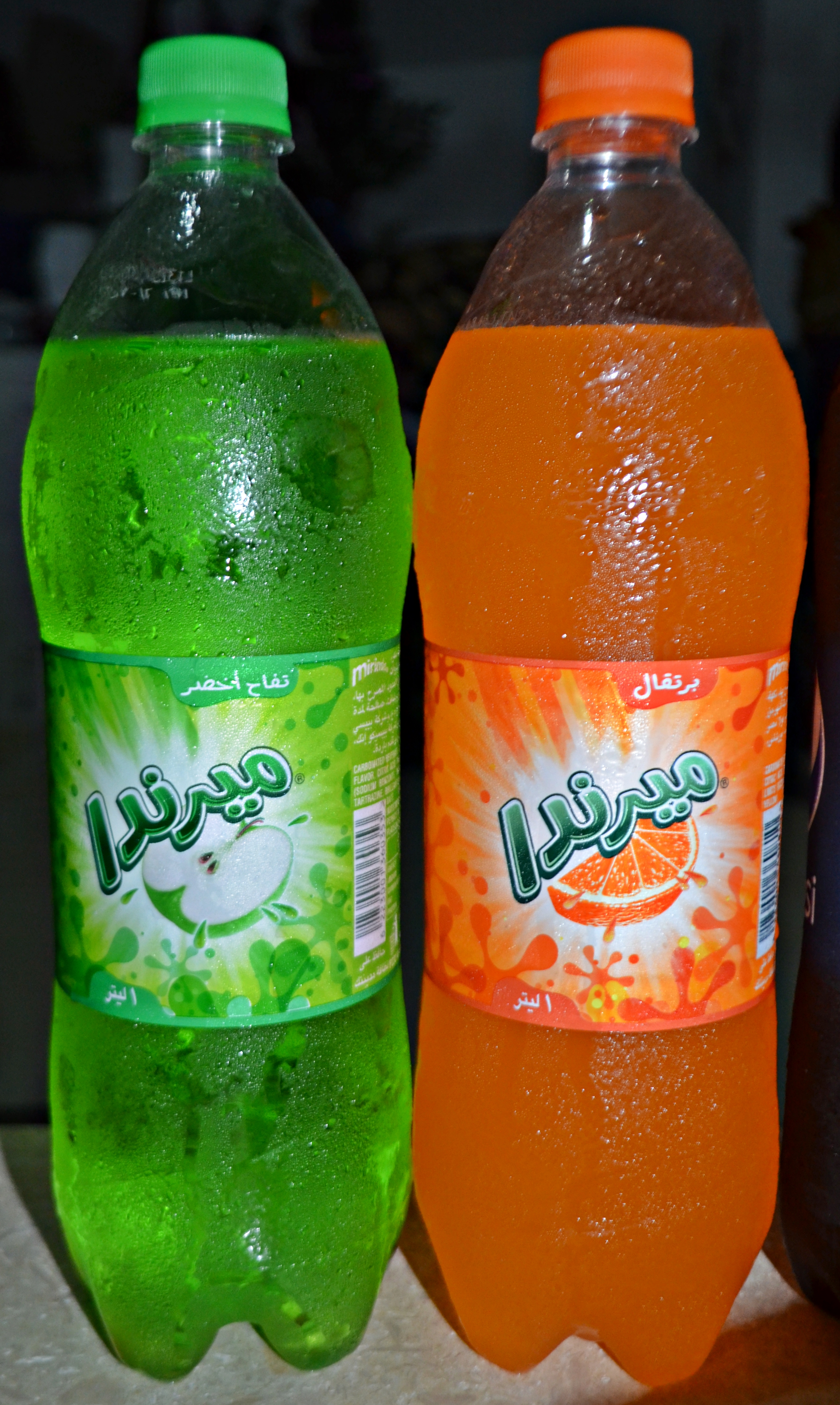 زجاجاتين بحجم 1 لتر لكل من منهما لمشروب ميرندا تفاح أخضر وبرتقال، مصر